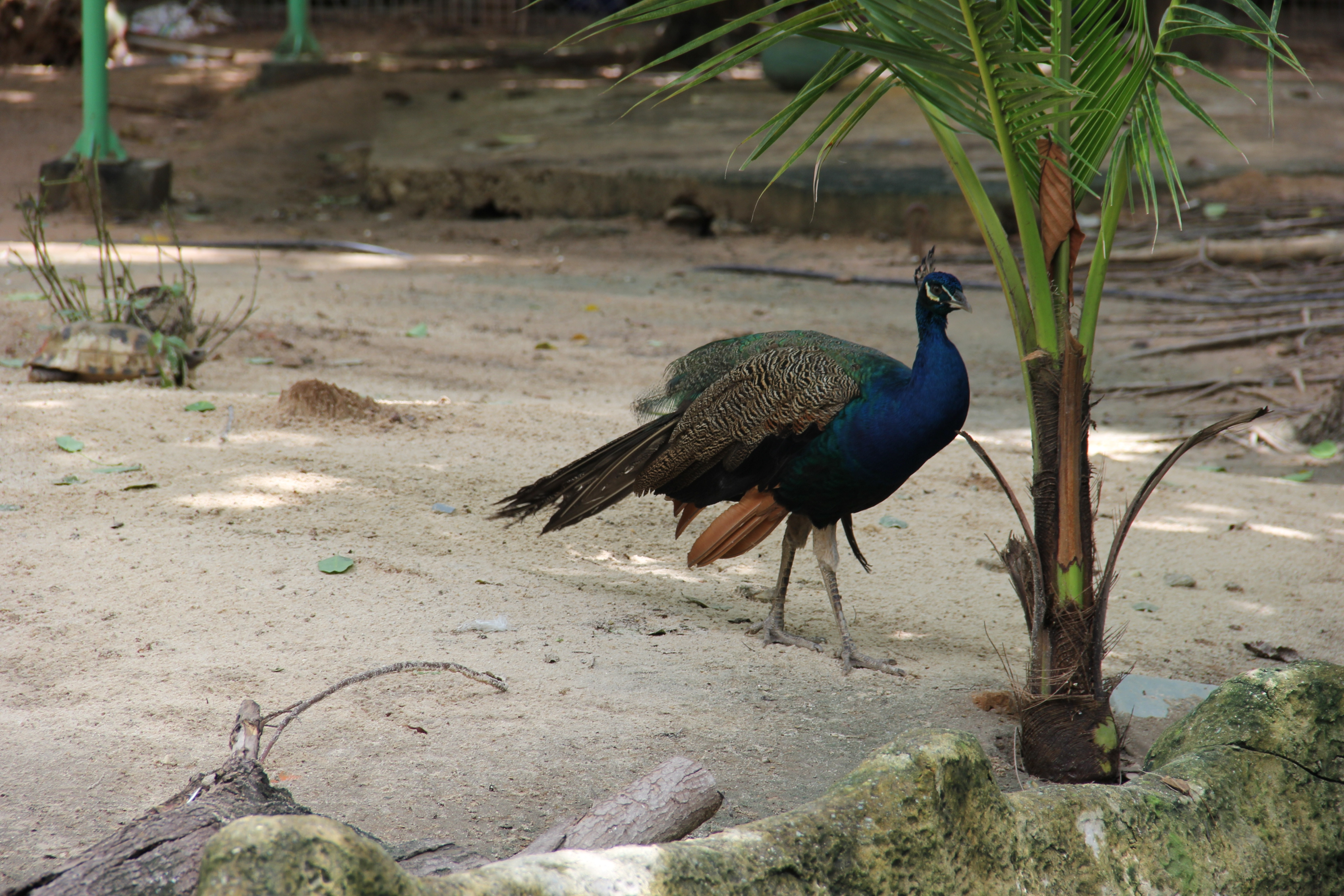 Hình tự chụp bằng máy cá nhân về một con công xanh ở Đại Nam